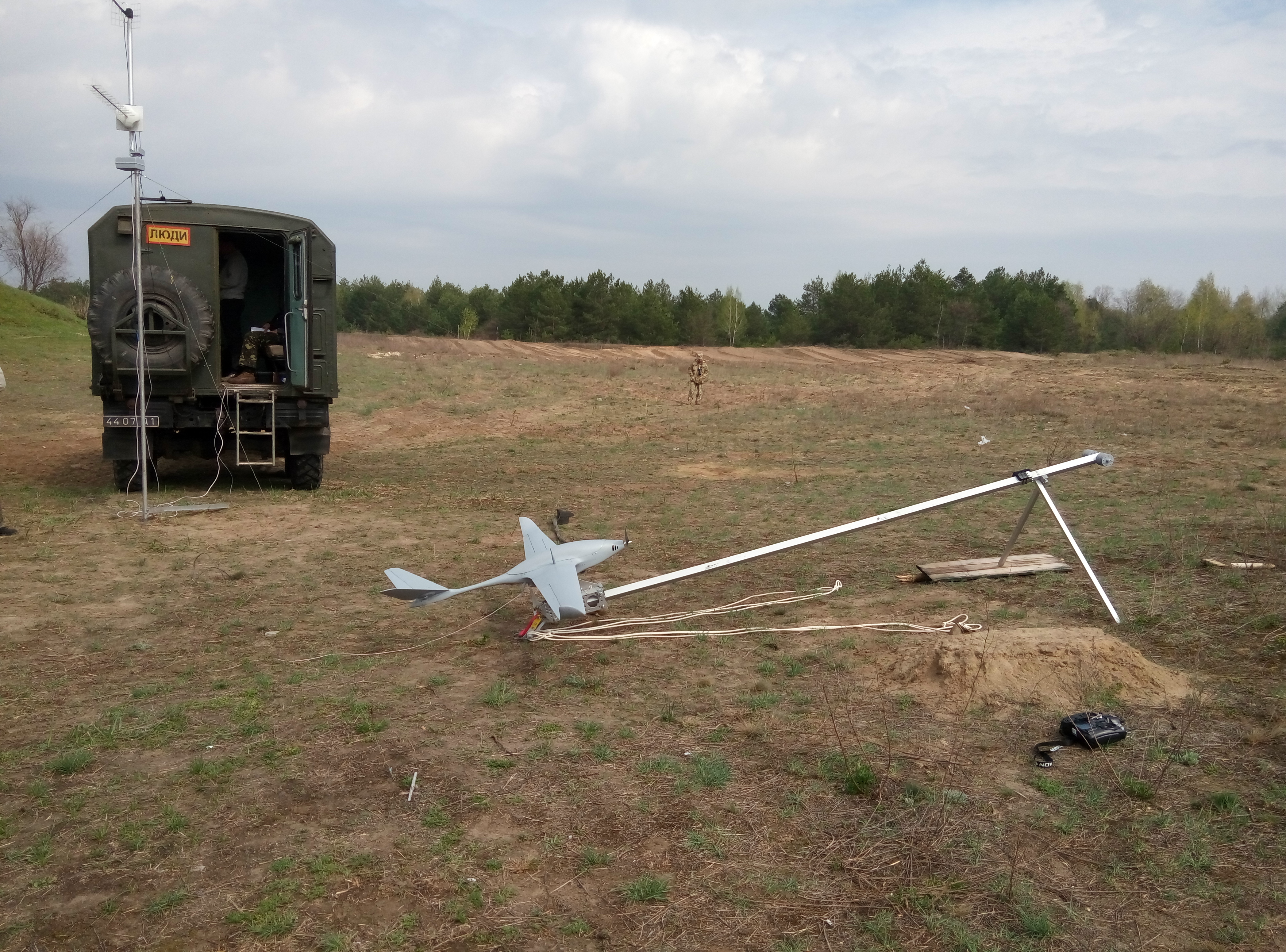 Спусковий пристрій